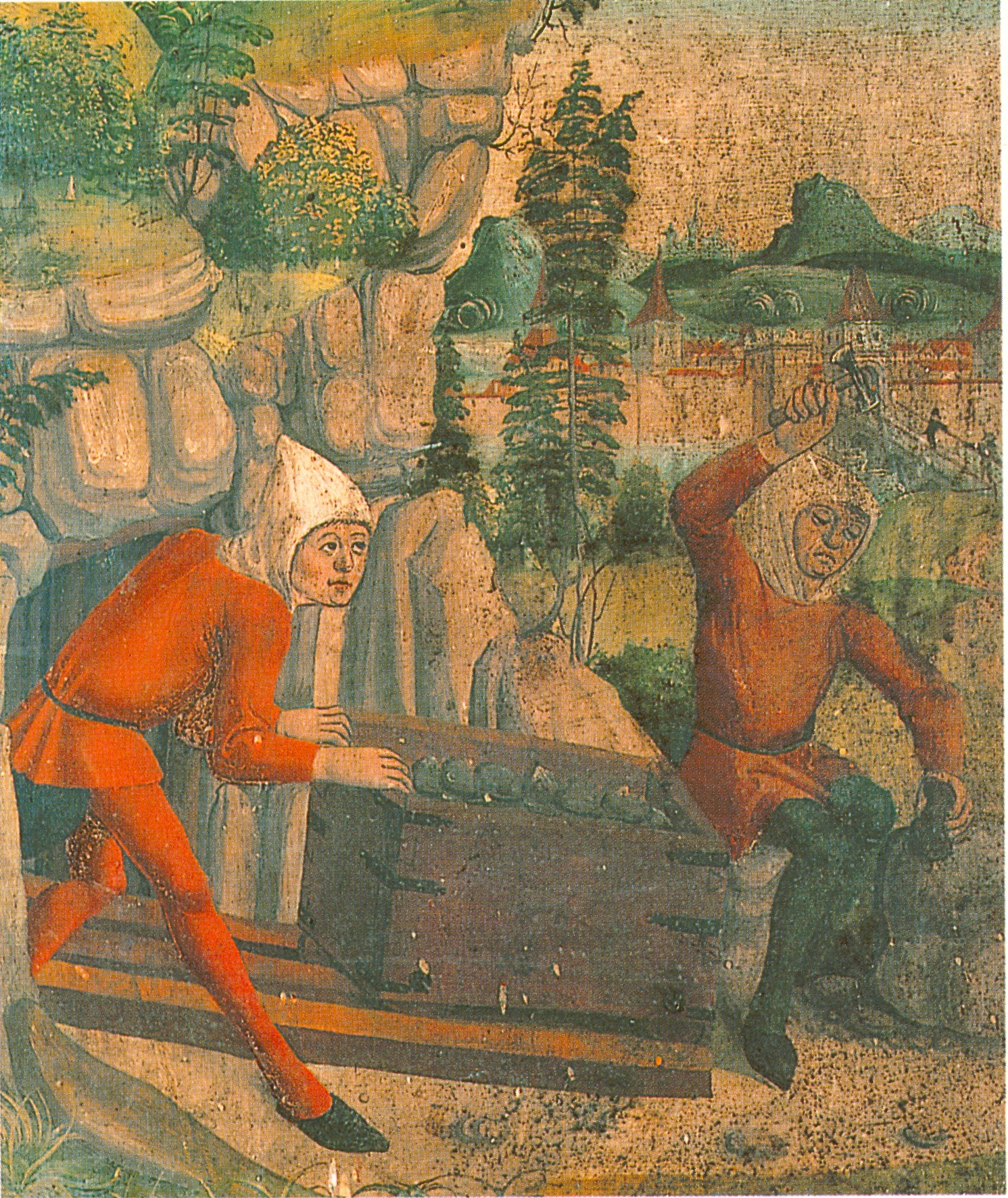 Truhenläufer und Erzausschläger Predella des Flügelaltars der Barbarakapelle in Gossensaß